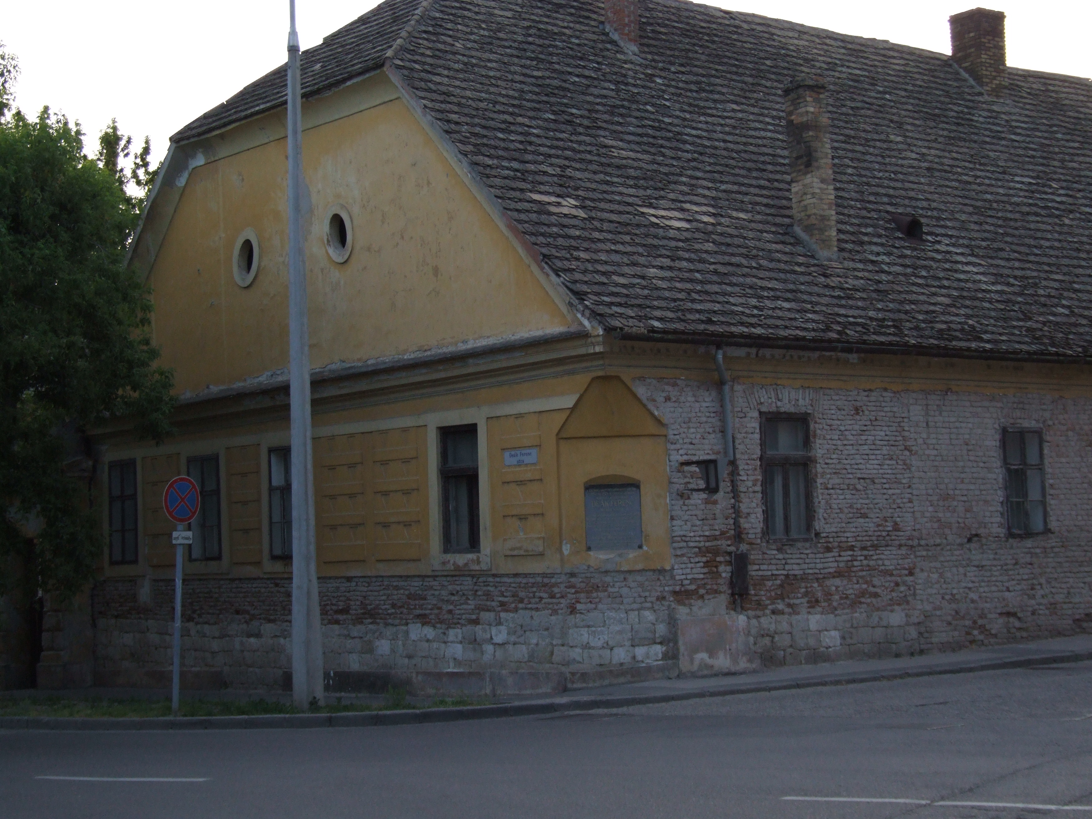 A paksi Szeniczey-kúria még felújítás előtt